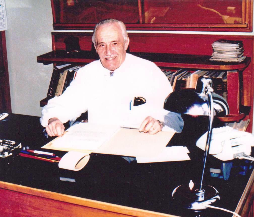 Rodolfo Amprino seduto, in camice, alla sua scrivania presso l'Istituto di Anatomia di Bari, 1989